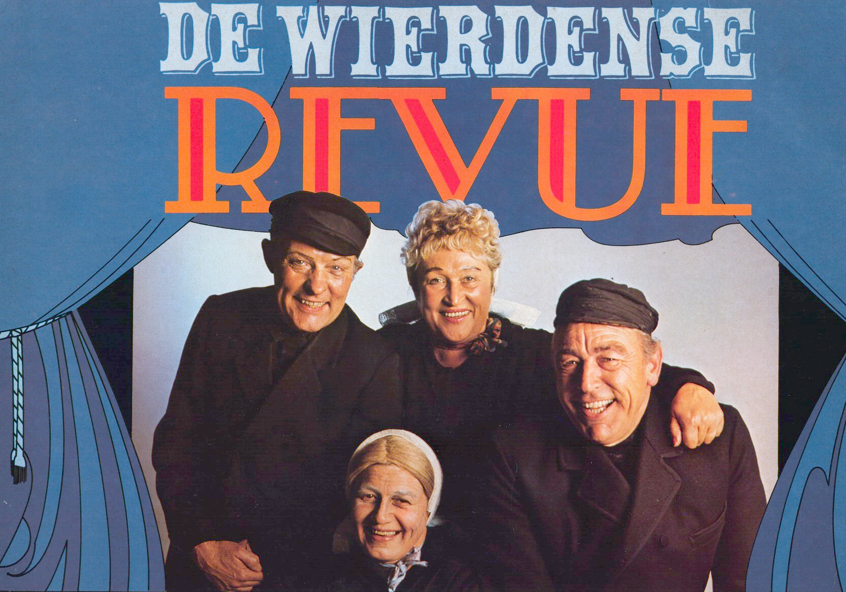 De Wierdense Revue 1979, v.l.n.r. Albert Paauwe, Miep Sanderman, Joke Wanschers en Gerard Höften.